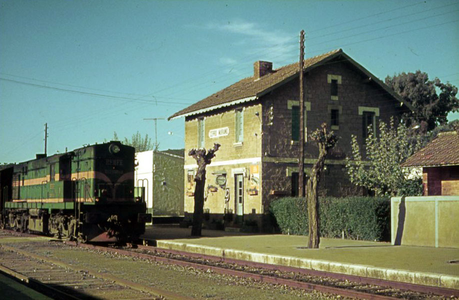 Un convoy llegando a la estación de Cerro Muriano, en 1979.